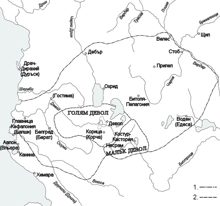 Границите на Деволския комитат през IX-X в. (1.) и на Големия и Малкия Девол през XI-XII в. (2.). Съставена по картата към статията Девол на Петър Коледаров в Кирило-Методиевска енциклопедия, Българска академия на науките, 1985, том 1, стр. 577.